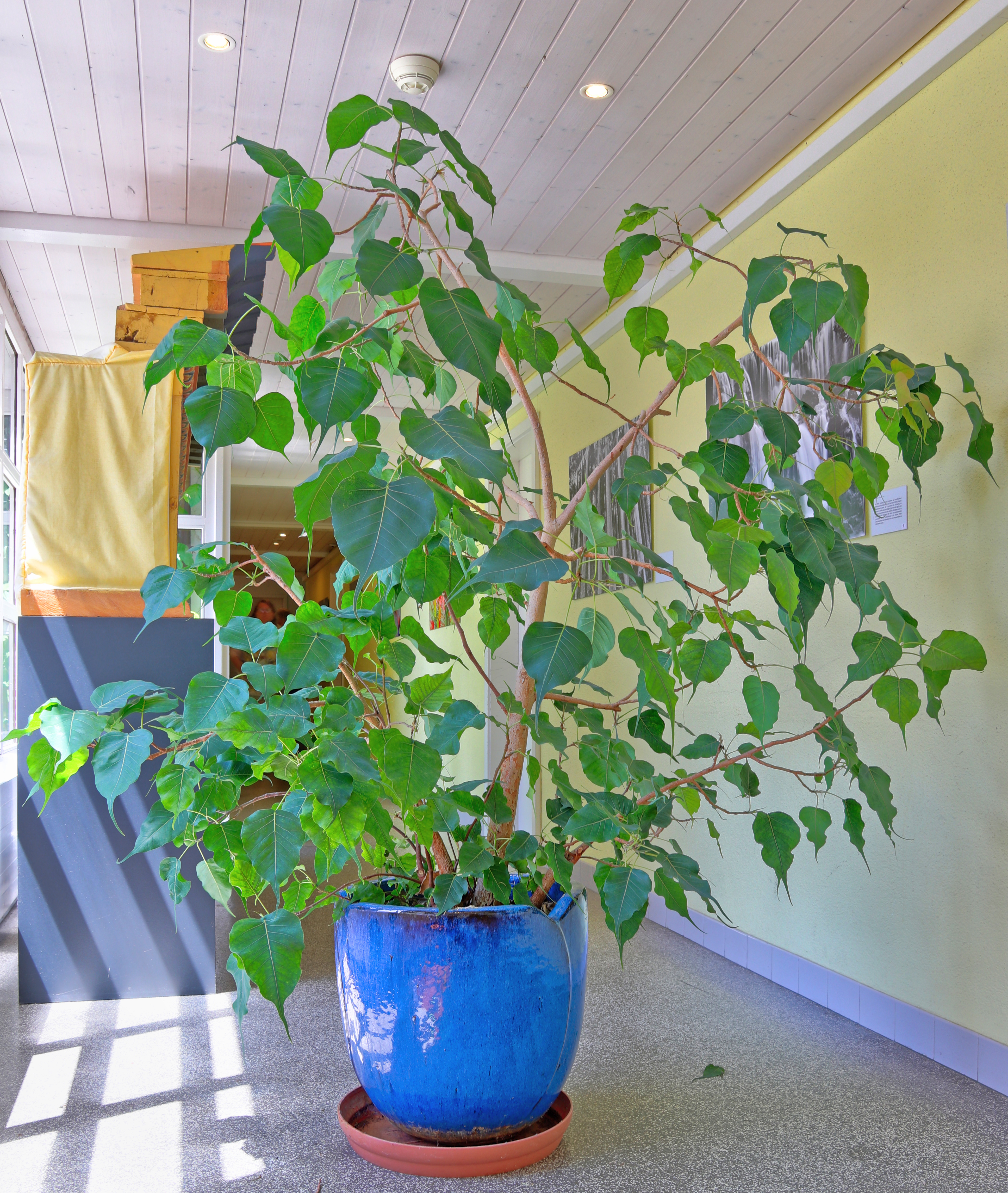 Ficus Religioa als Topfpflanze im Landguet Riedhof in Niederwangen bei Bern.